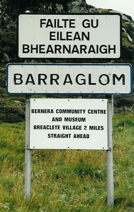 Bhearnaraigh_Schëld.